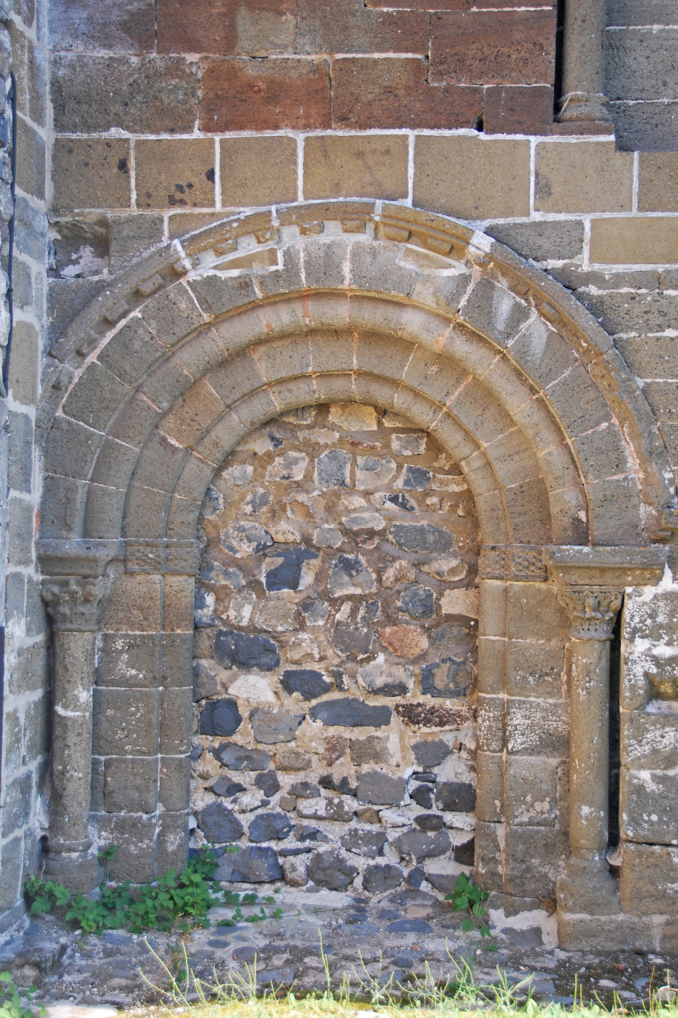 Chanteuges, Kirche, Nordportal, vermauert